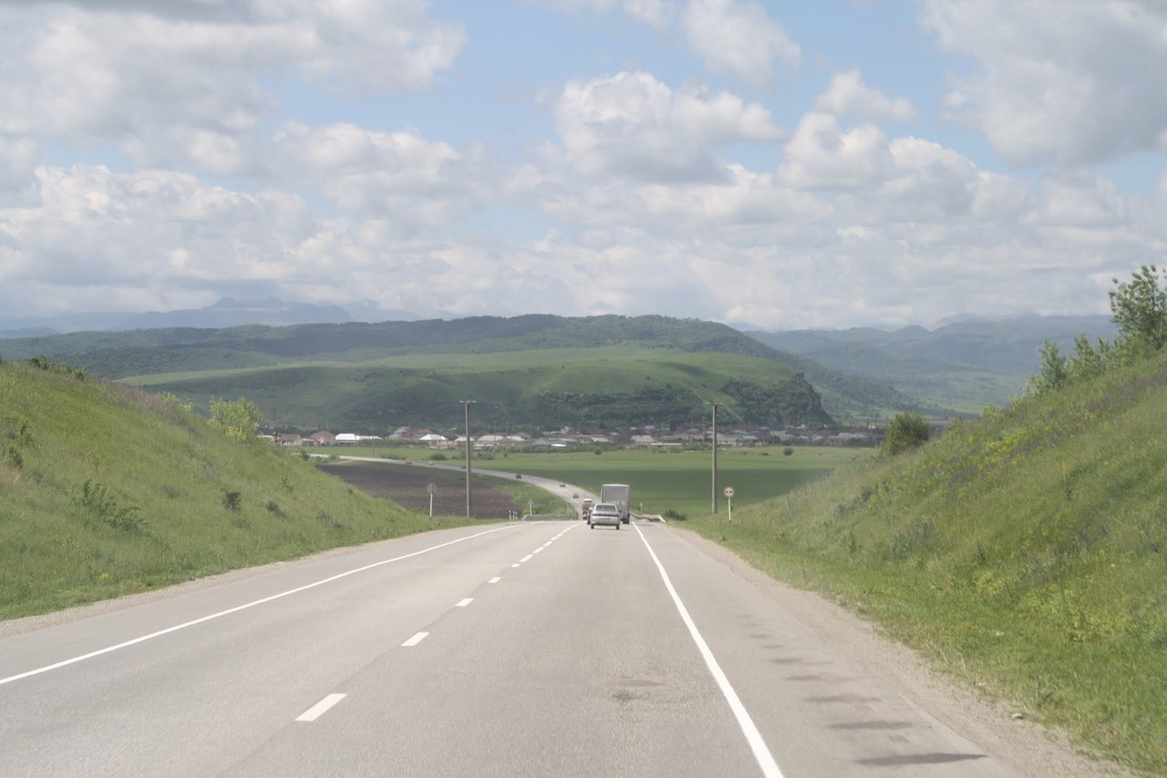 Адыгэбзэ: Псыгуэнсу дэлъэдапIэ